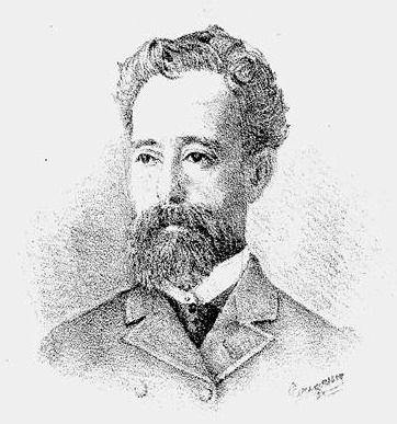 Quintino Bocaiúva